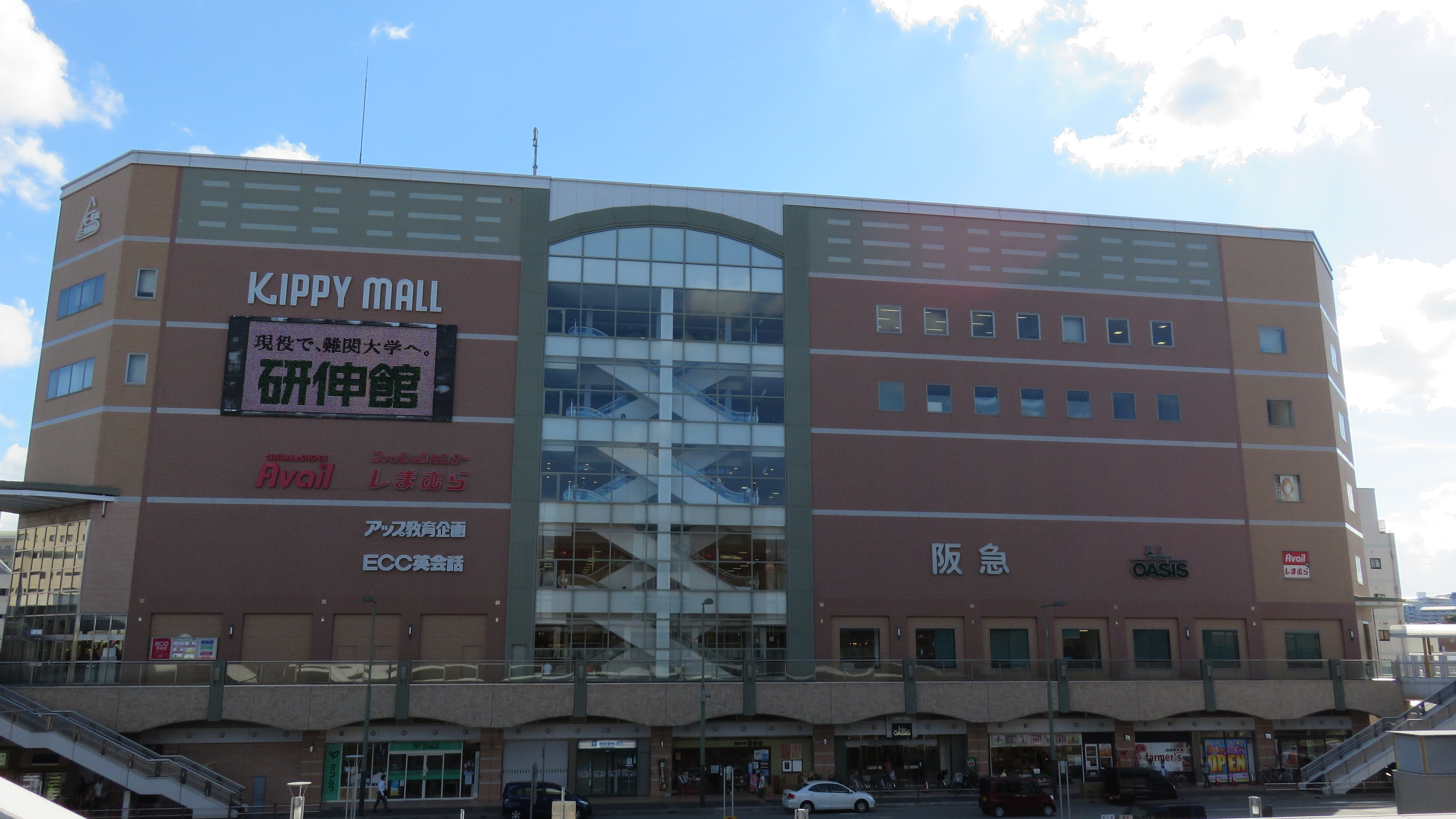 兵庫県三田市 三田駅前 キッピーモールの写真